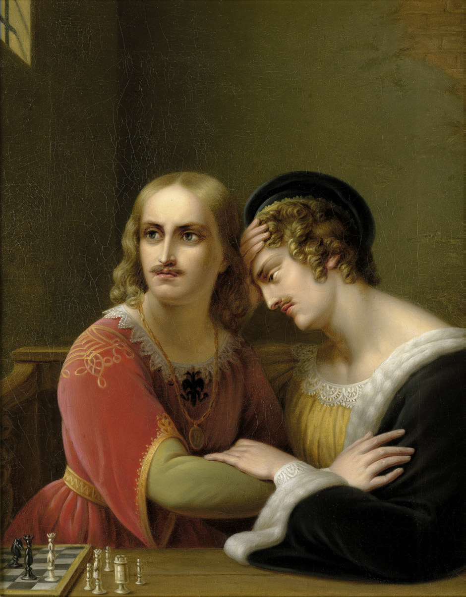 Pauline Soltau (1833–1902): Conradin von Schwaben und Friedrich von Baden beim Schachspiel. Öl auf Leinwand. 51 x 41 cm. Verso auf der Leinwand von alter Hand bez. "Pauline Soltau geb. Suhrlandt n. d. Orig. des Prof. R. Suhrlandt 1860" (illustriert eine Szene aus Johann Jakob Bodmers Gedicht "Conradin von Schwaben": der Moment, in dem die beiden Gefangenen von ihrer Verurteilung zum Tode erfahren haben)